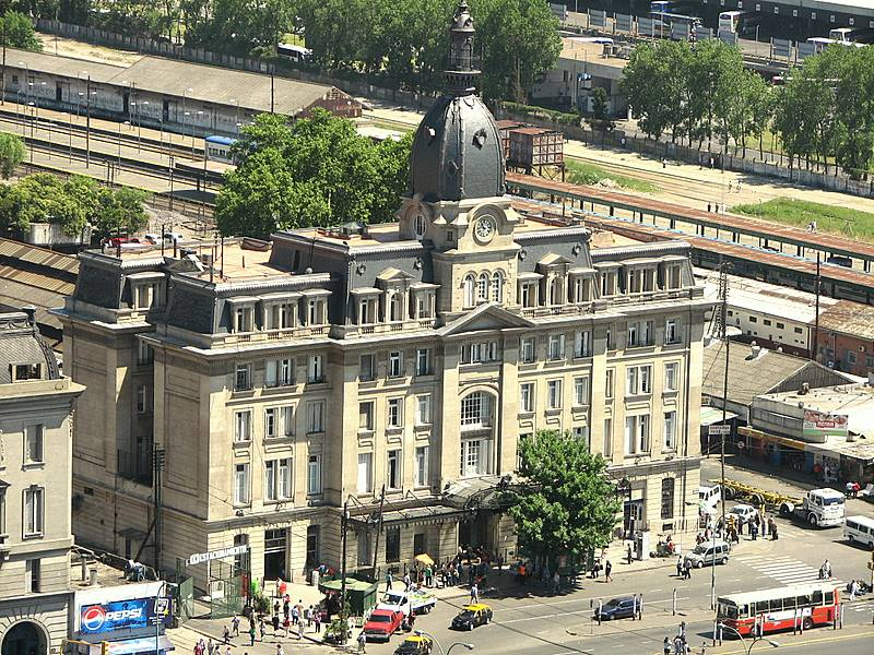 Estación terminal Retiro, línea Belgrano Norte. Buenos Aires.